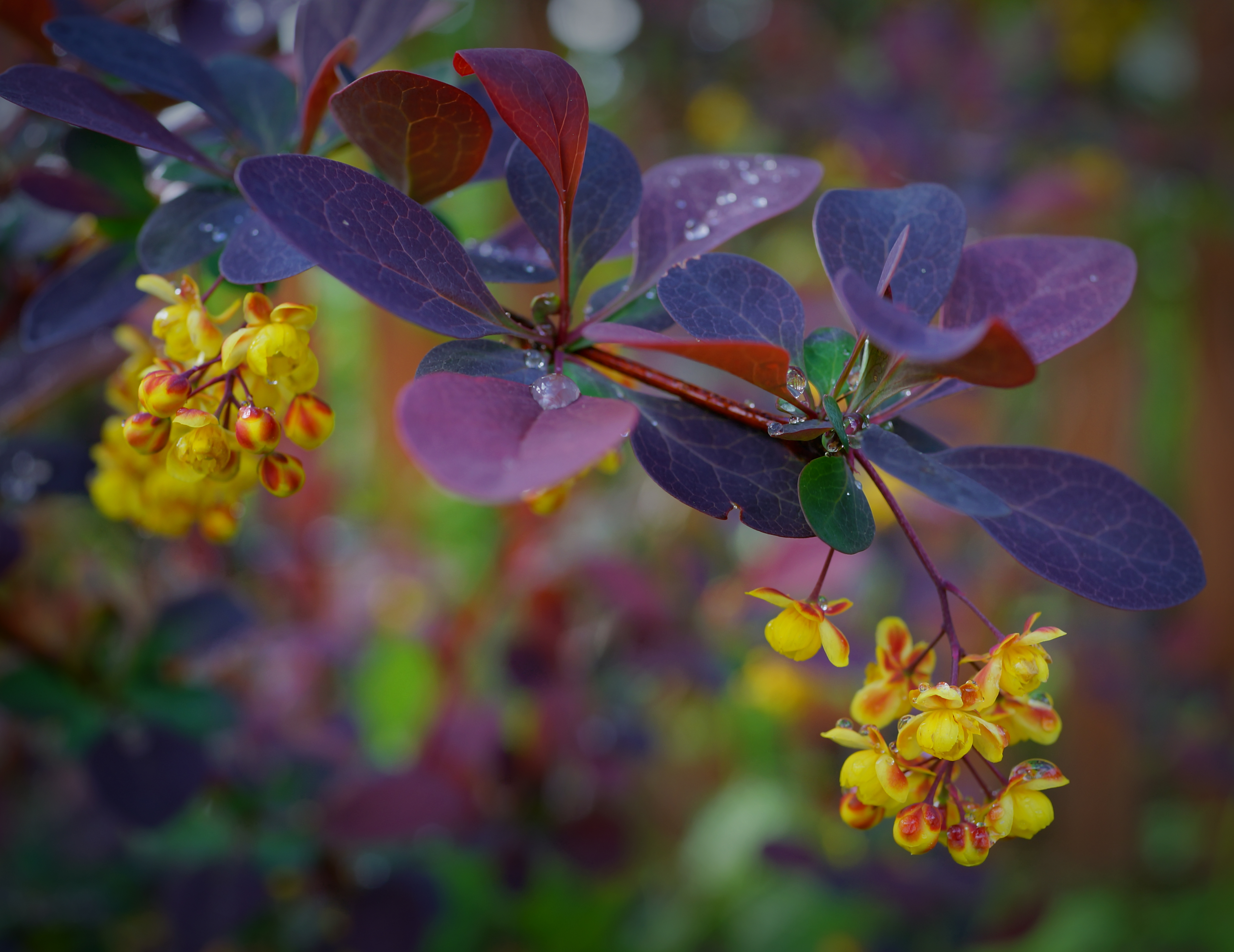 Барбарис оттавский